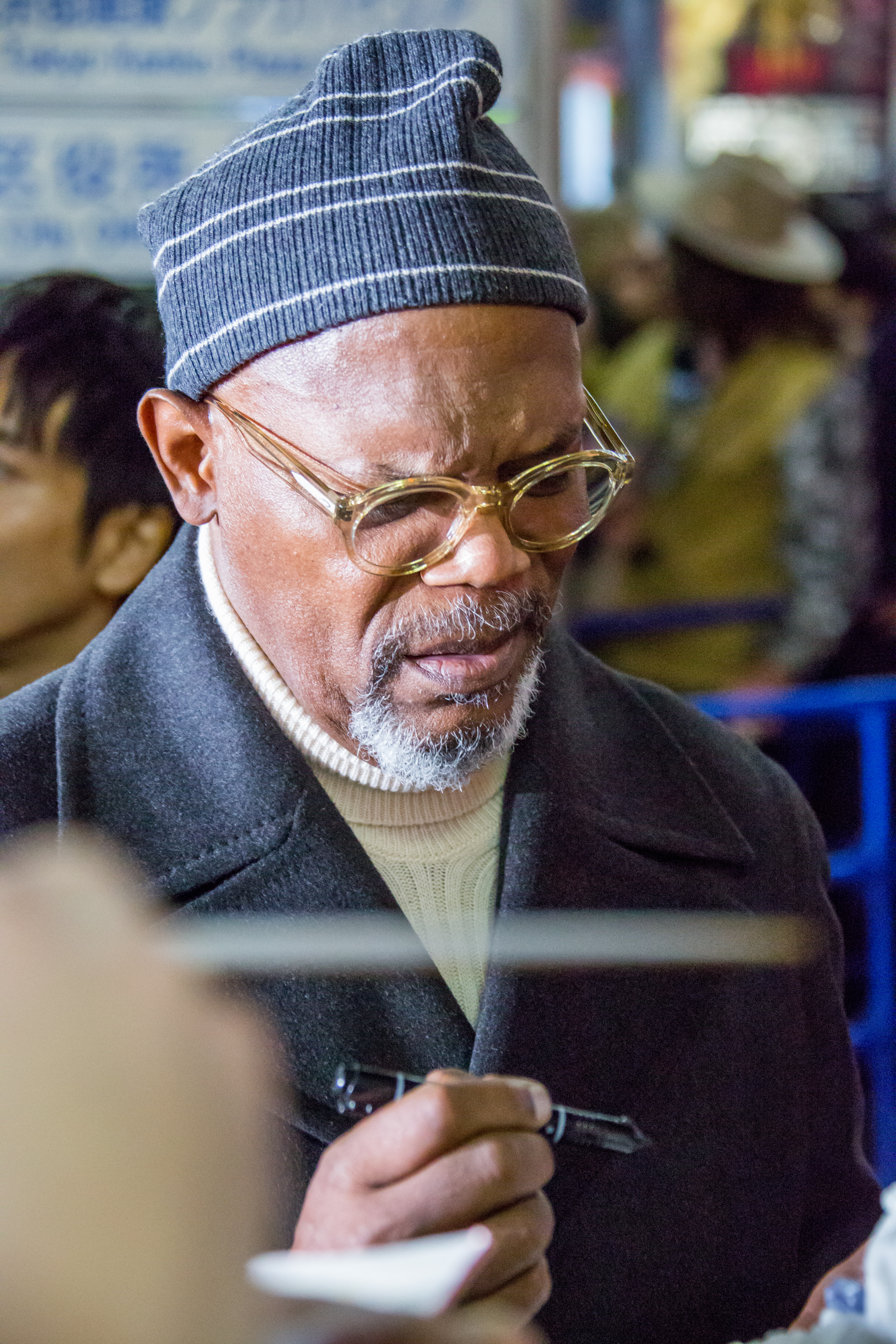 キングコング: 髑髏島の巨神 ジャパンプレミア レッドカーペット サミュエル・L・ジャクソン